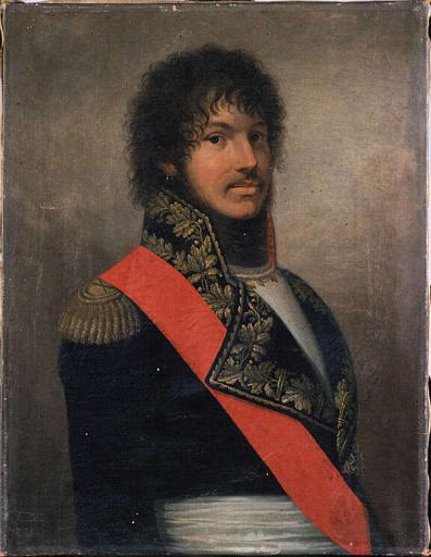 Joachim Murat (1767-1815), maréchal d'Empire et roi de Naples, en costume de général de division de la République française.